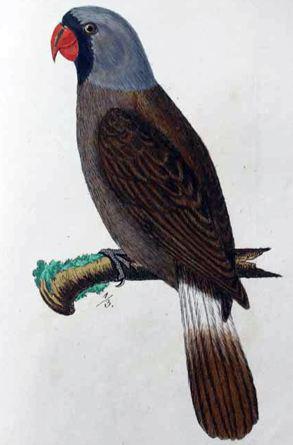 Hahn's illustration of the Mascarene Parrot, possibly derived from Martinet's. Originally published in Hahn. C.W. (1834) 1834–41. Ornitologische Atlas oder naturgetreue Abbildung und Beschreibung der aussereuropäischen Vögel. Erste Abteilung: Papagaien. Nurnberg, C.H.Zeh'sche Buchhandlung, 54.